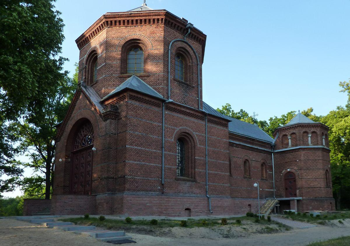 To drugie z ujęć tego kościoła w stronę północno-zachodnią. Na nim nie ma już wprawdzie zwisających kabli, ale za to musiałem obciąć krzyż na szczycie...